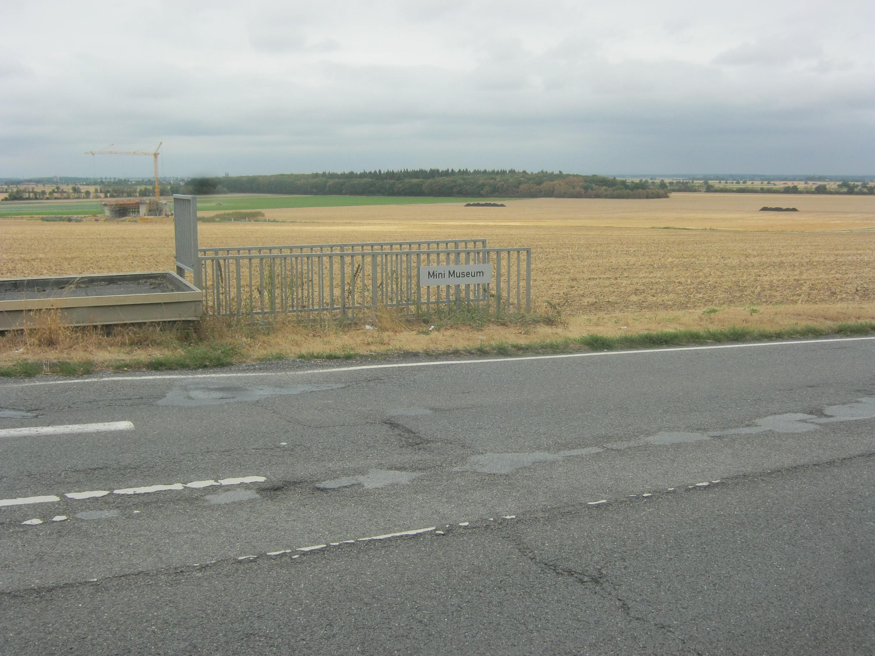 Der Zugang zum Minimuseun